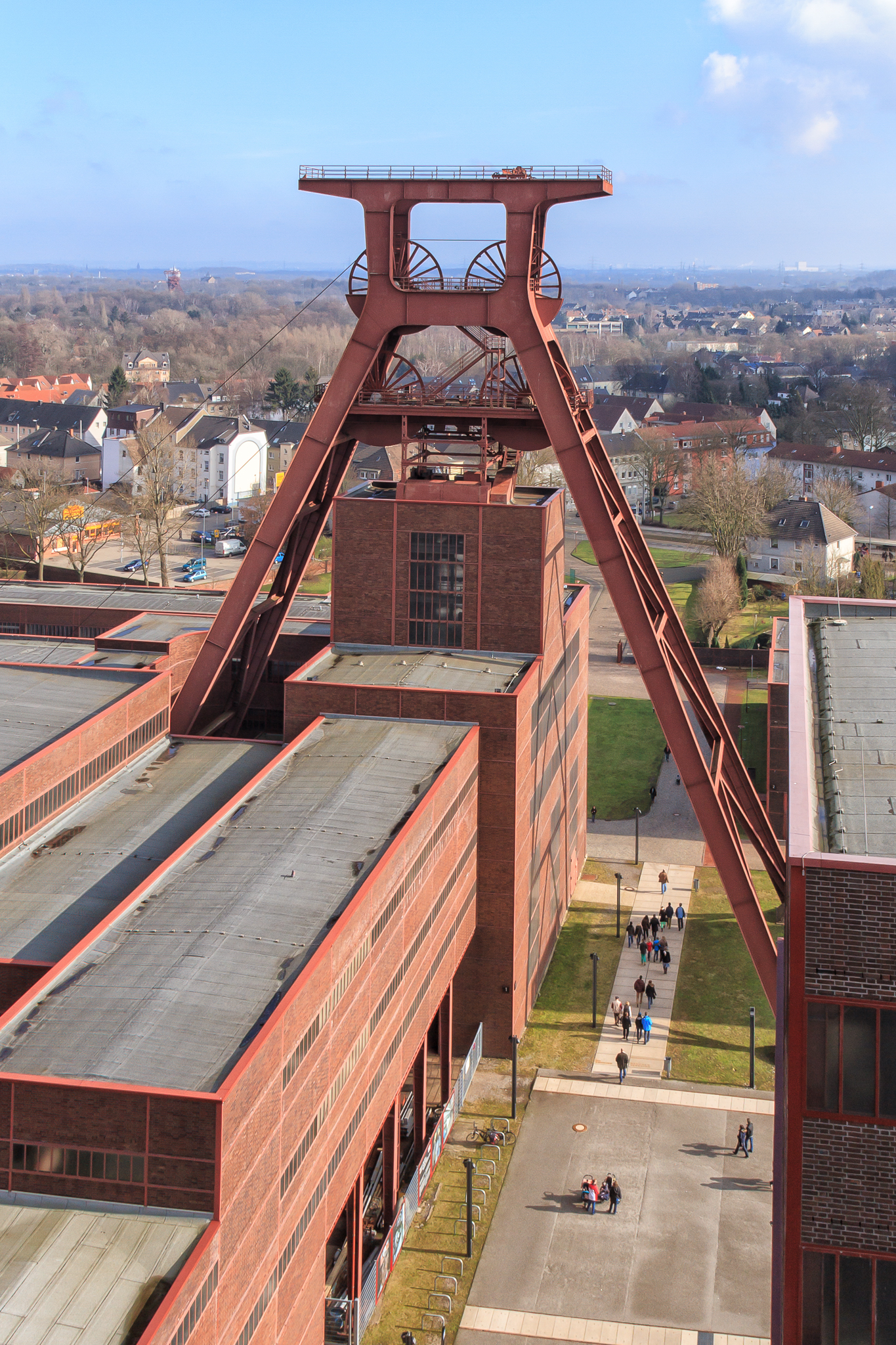 Zeche Zollverein - Schacht 12 - Rückansicht - 2013